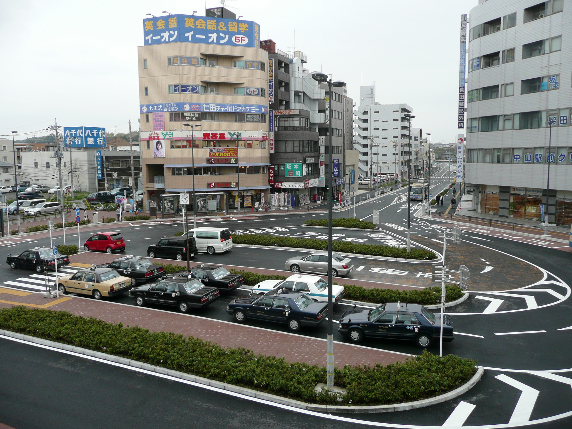 Nakayama Station (Kanagawa) north plaza. / JR横浜線中山駅北口駅前広場